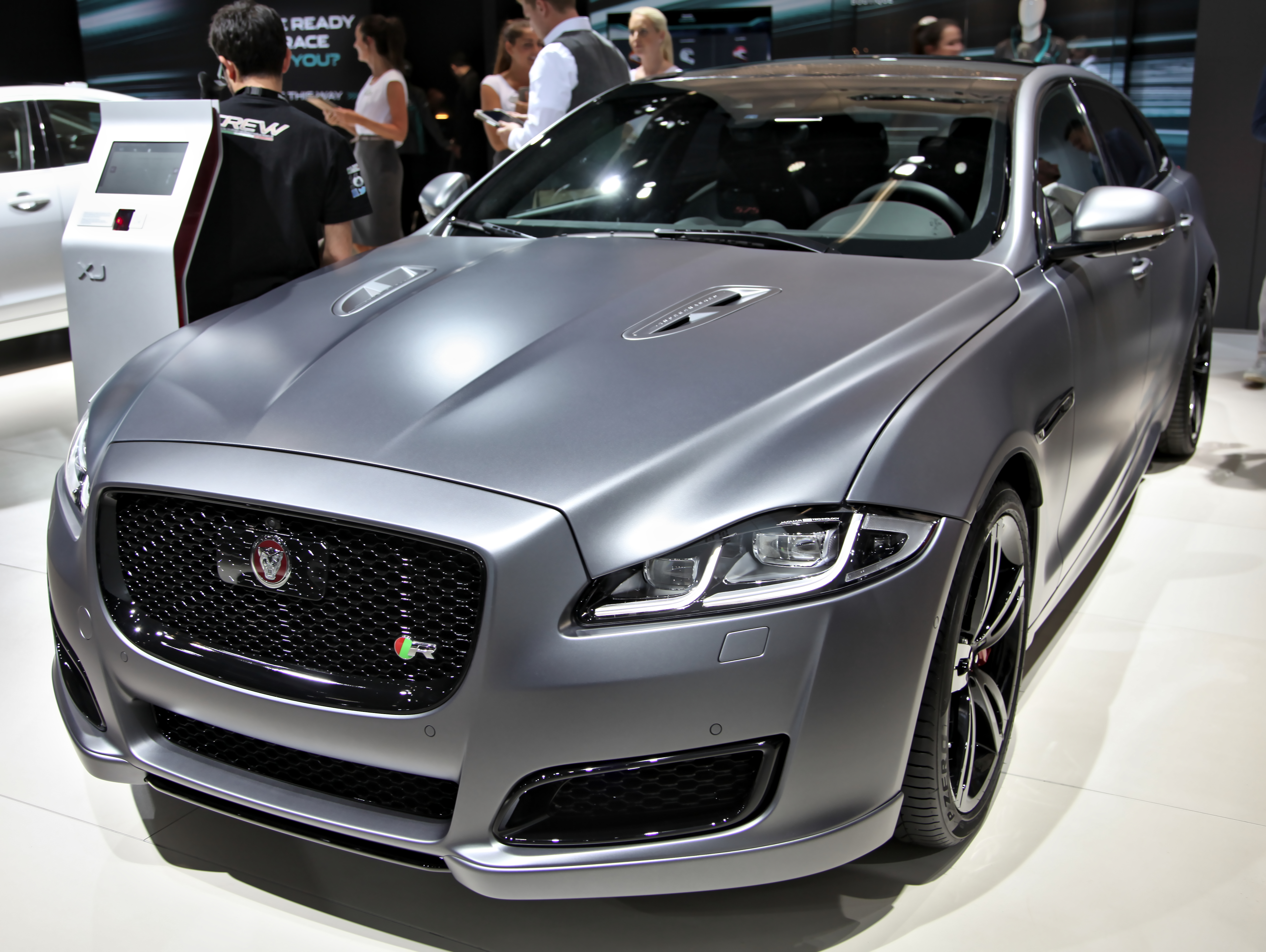 Jaguar XJR 575